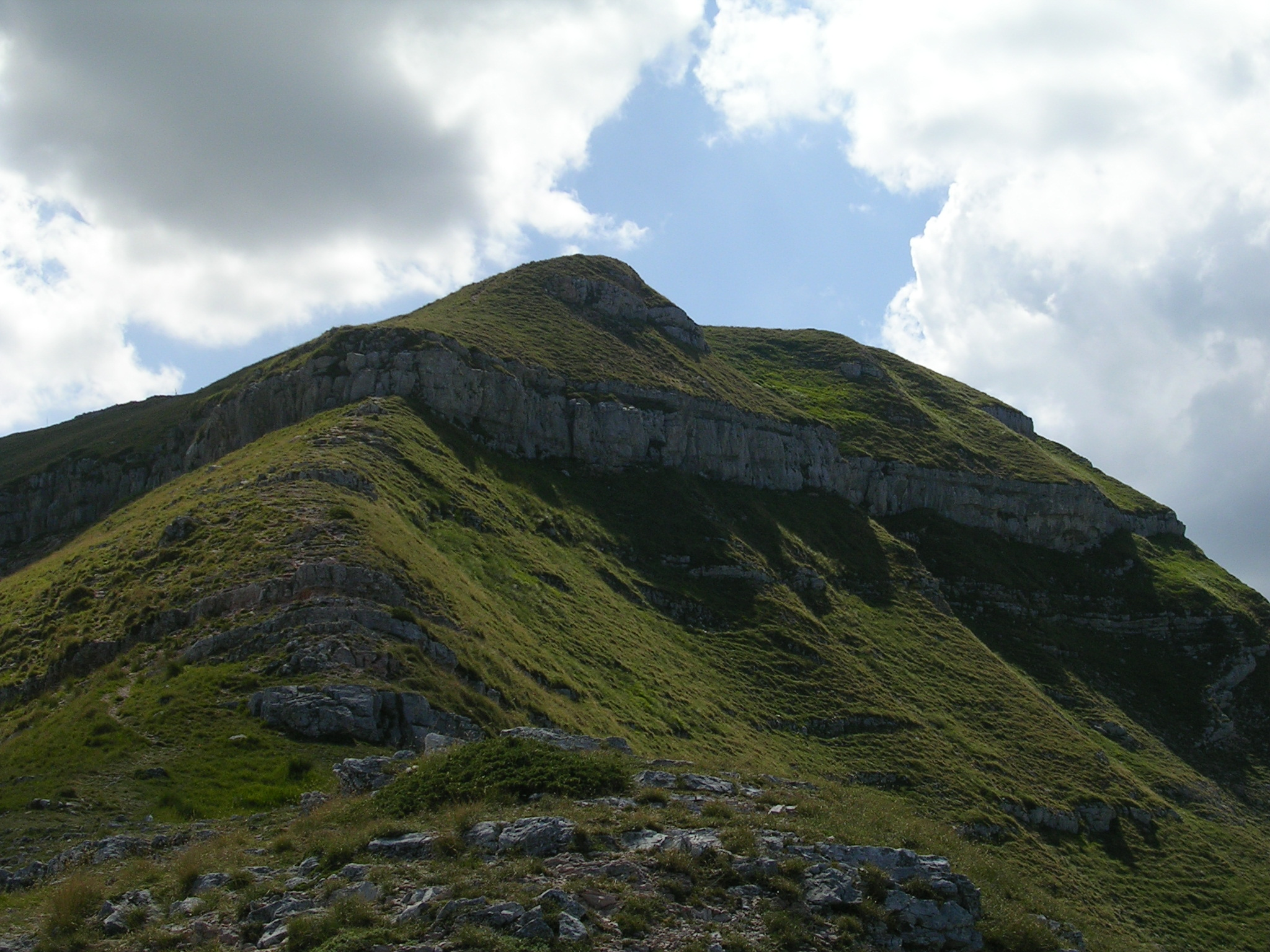 Monte Sibilla la corona